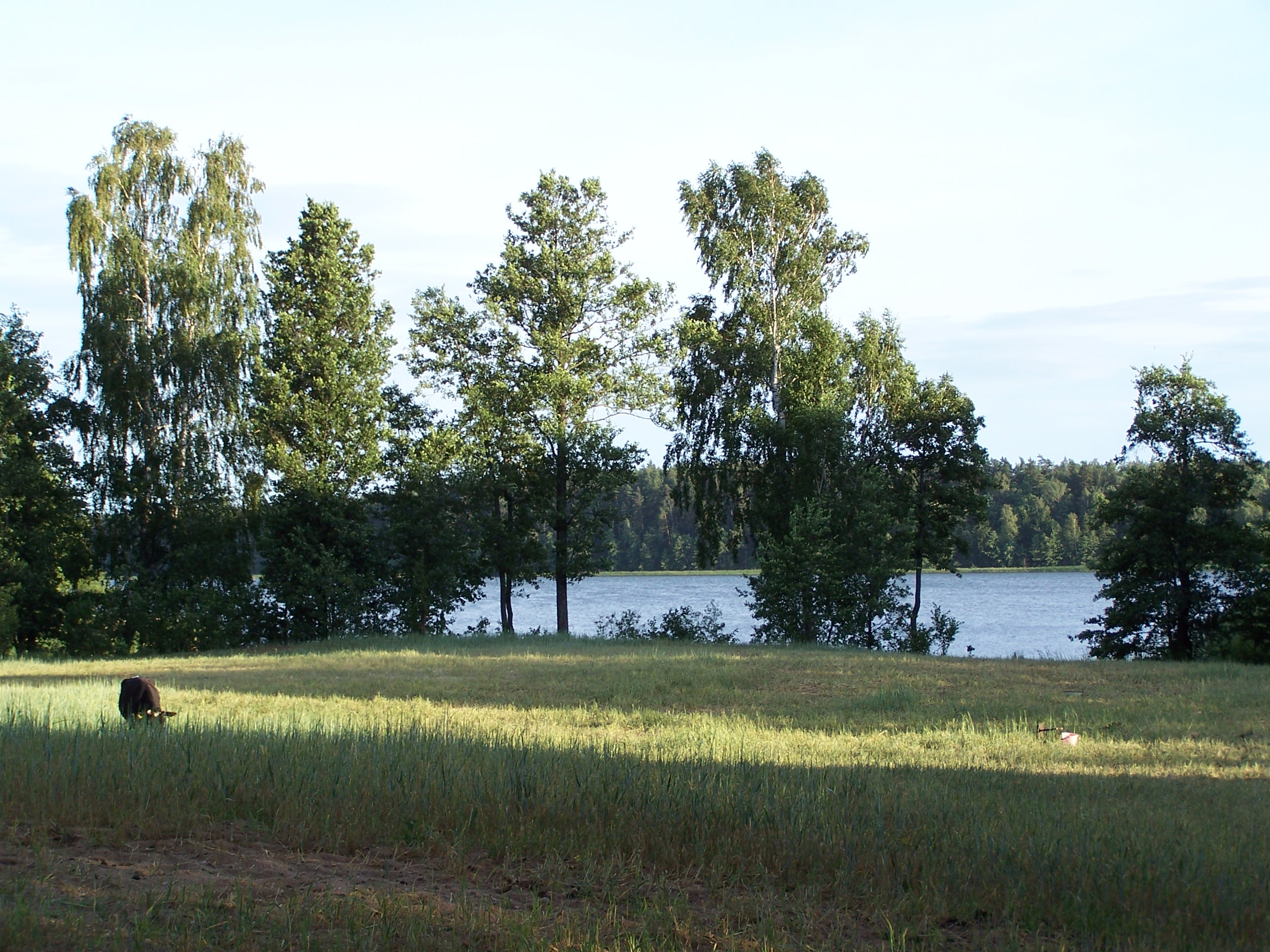 Posejnele - okolice wsi